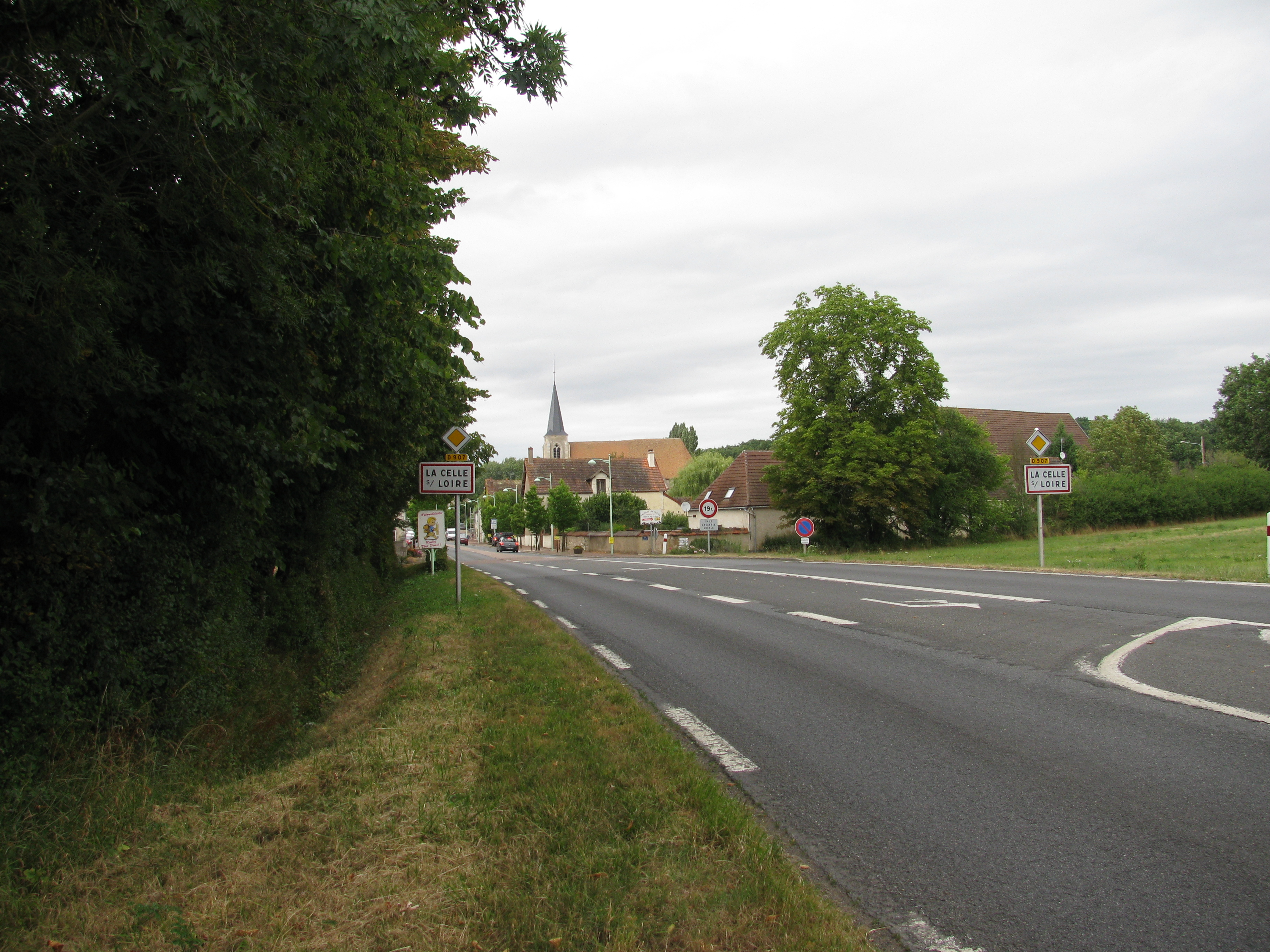 Entrée sud du village de La Celle-sur-Loire